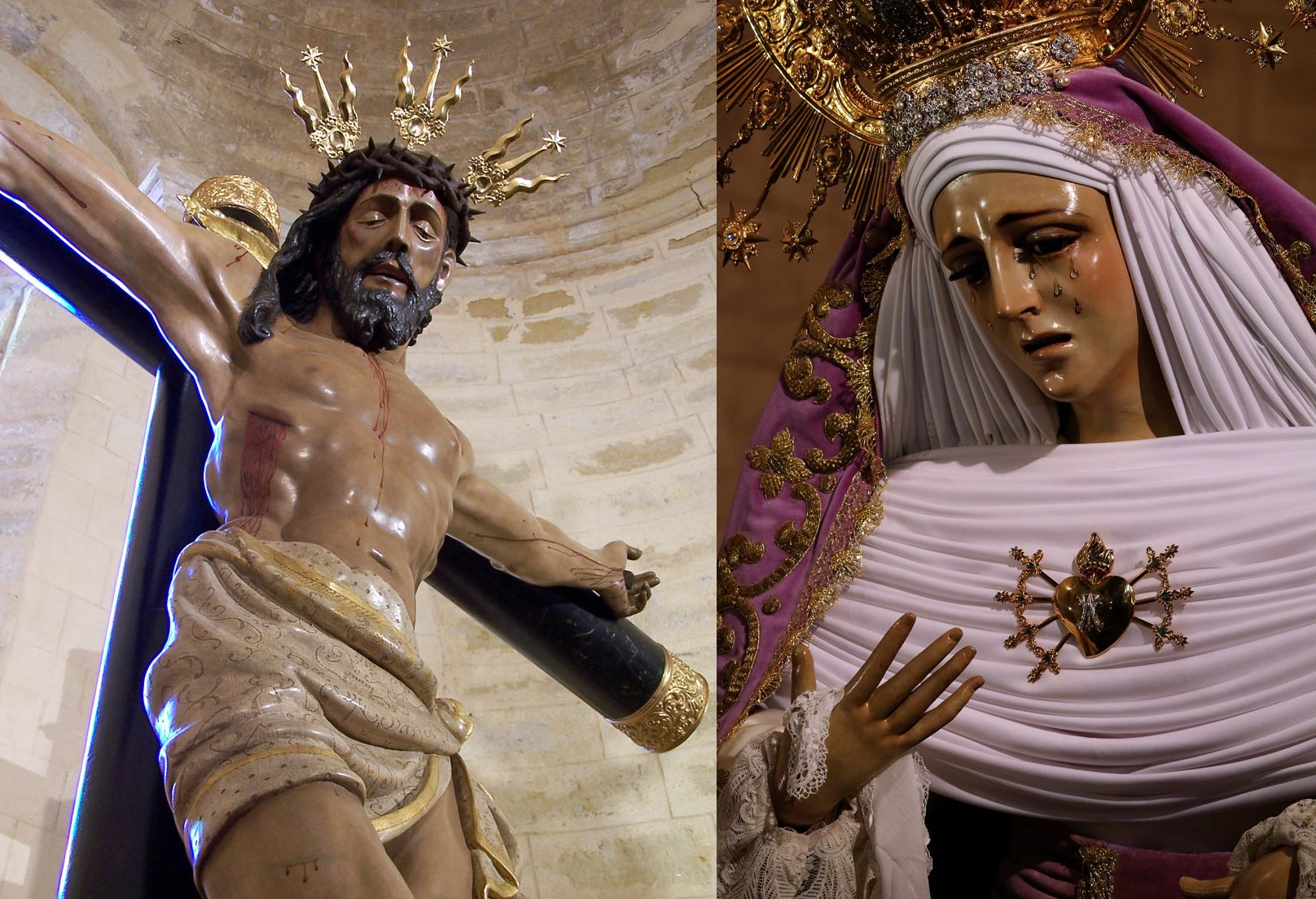 Santísimo Cristo de la Misericordia y Nuestra Señora de las Lágrimas en su Desamparo